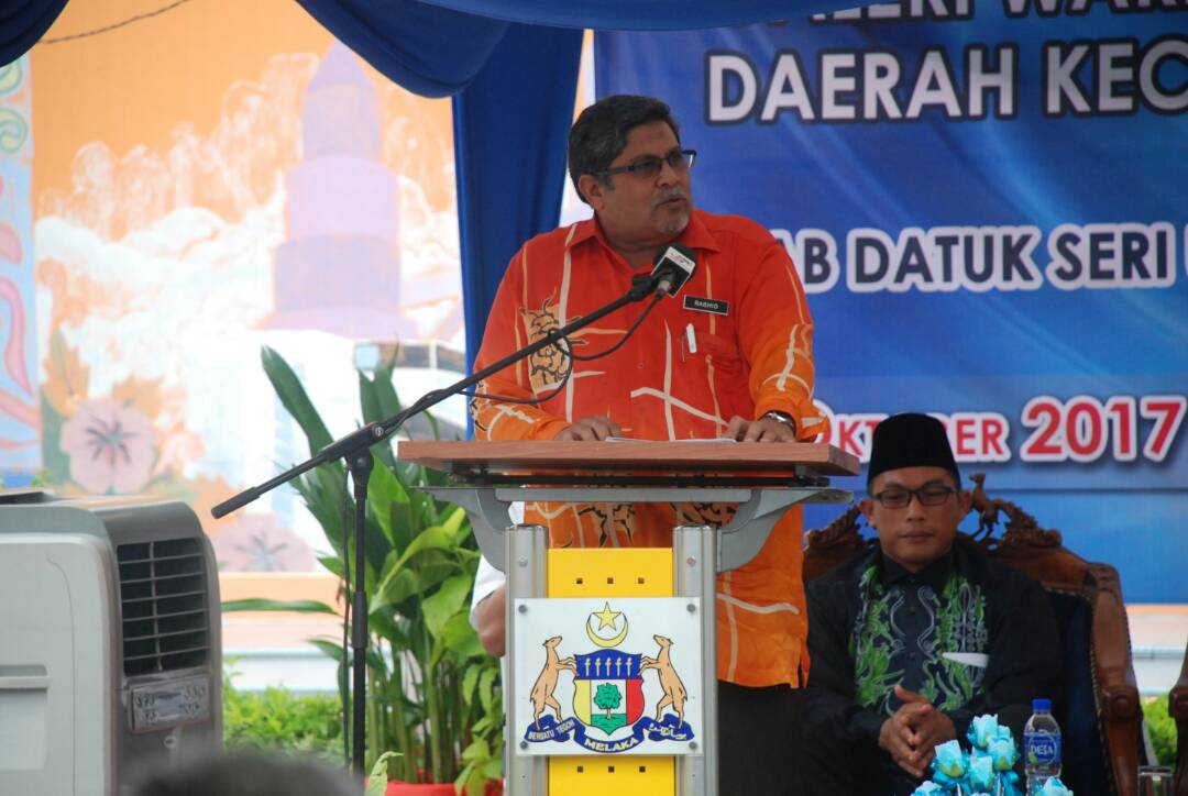 Ucapan oleh Tuan Haji Mohd. Rashid Bin Mohd. Sidek, Timbalan Pengarah Pendidikan Melaka